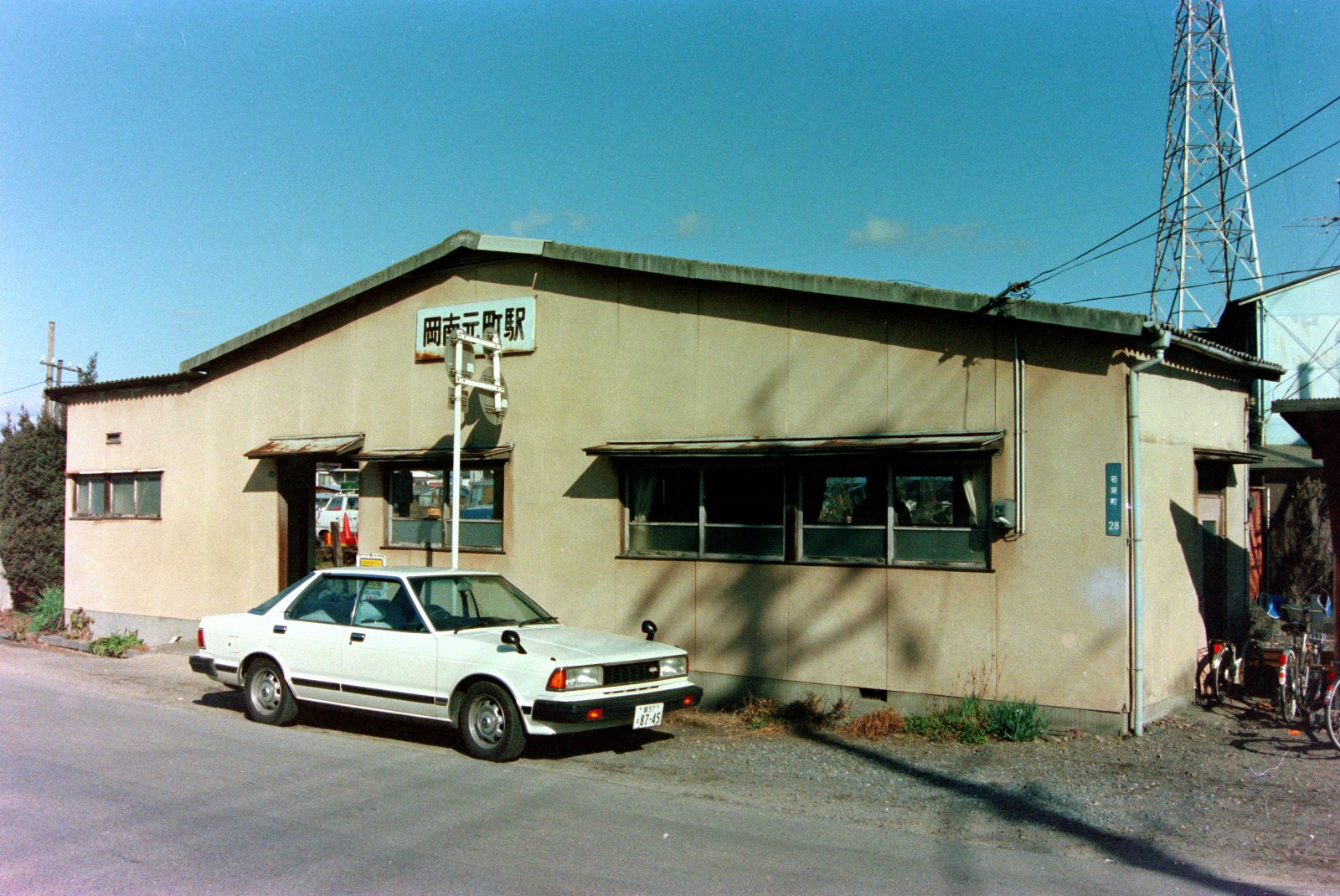 岡山臨港鉄道の旅客駅・岡南元町駅